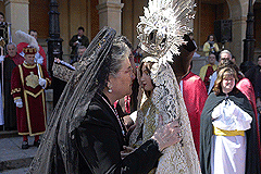 La entonces alcaldesa de Soria retirando el manto y besando a la Virgen de La Blanca (s. XVIII) en la Plaza Mayor la mañana del Domingo de Resurrección.